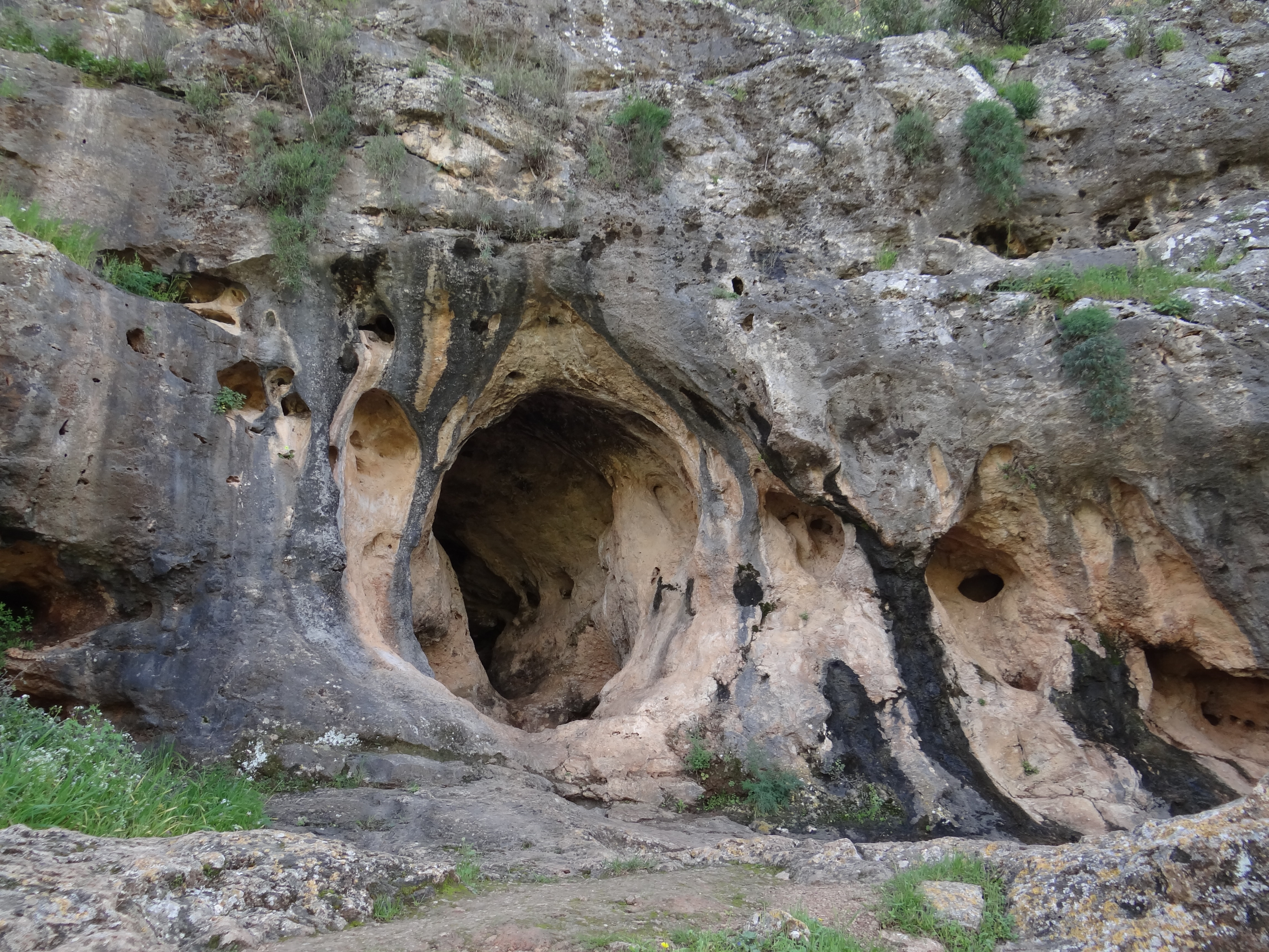 מערת הגדי היא אתר ארכאולוגי-פרהיסטורי מן התרבות המוסטרית של התקופה הפלאוליתית התיכונה במערב הכרמל. האתר, הכולל מערה קטנה וטרסה טבעית בפתחה